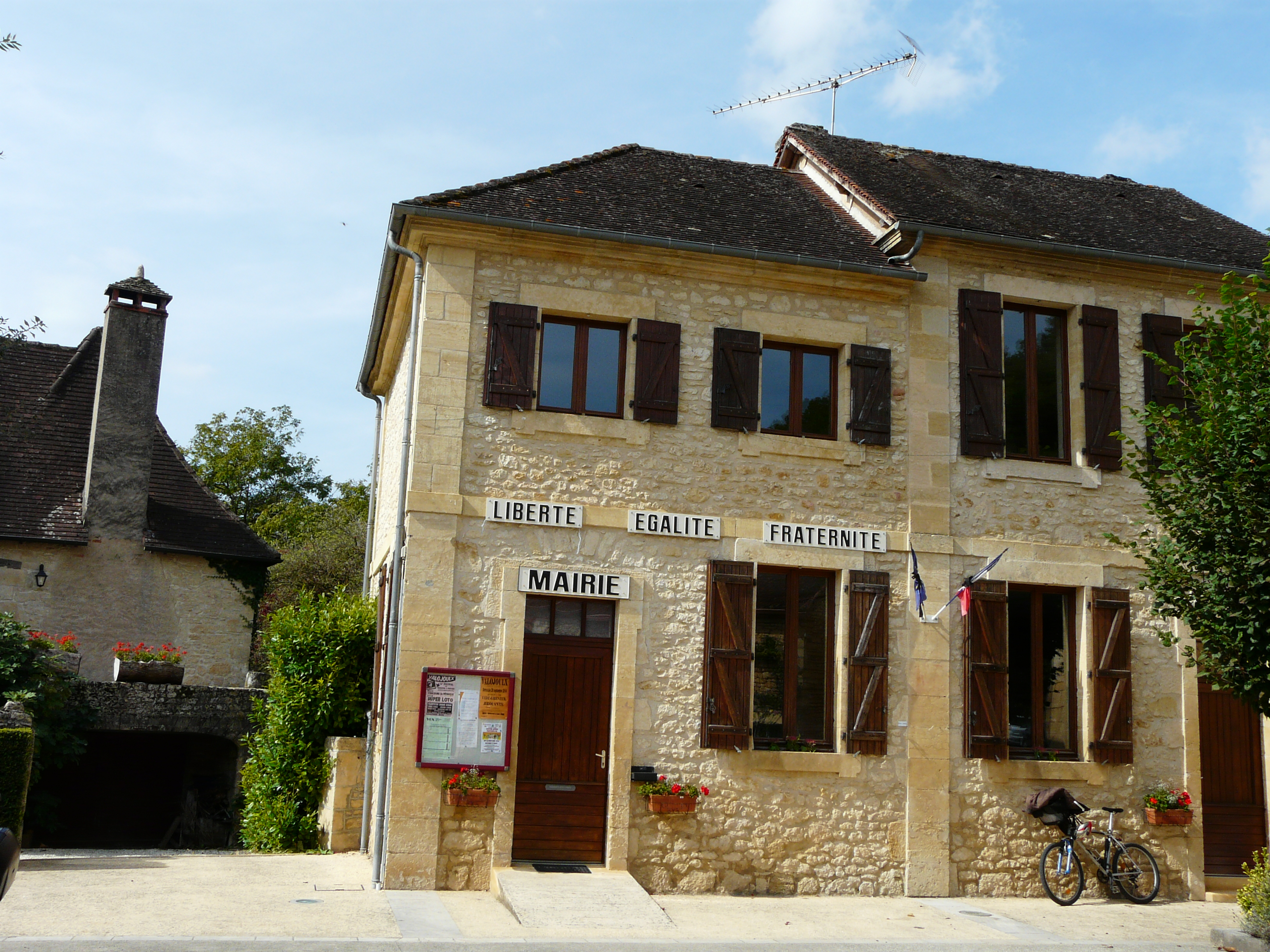 La mairie de Valojoulx, Dordogne, France.